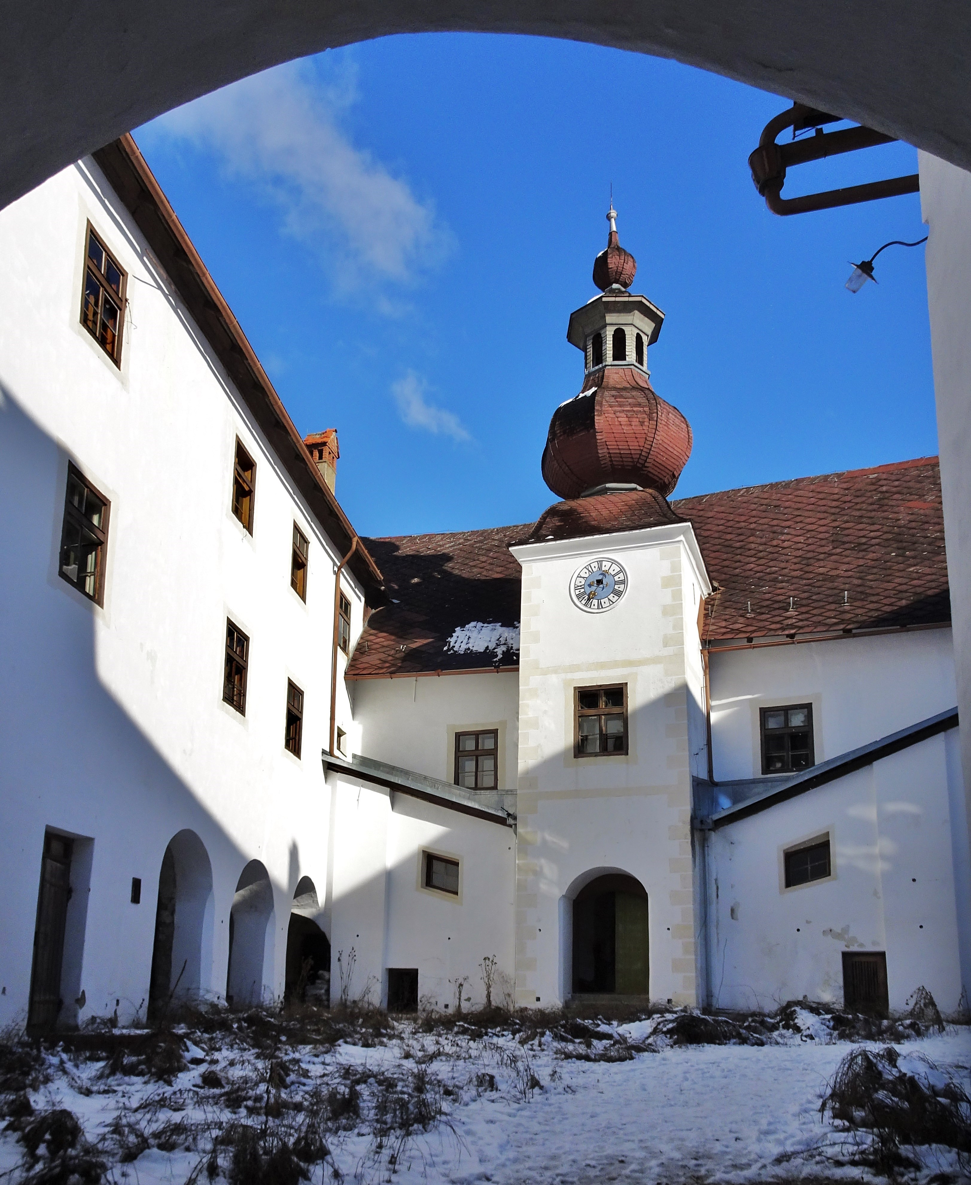 Schloss Grades, Blick in den Innenhof